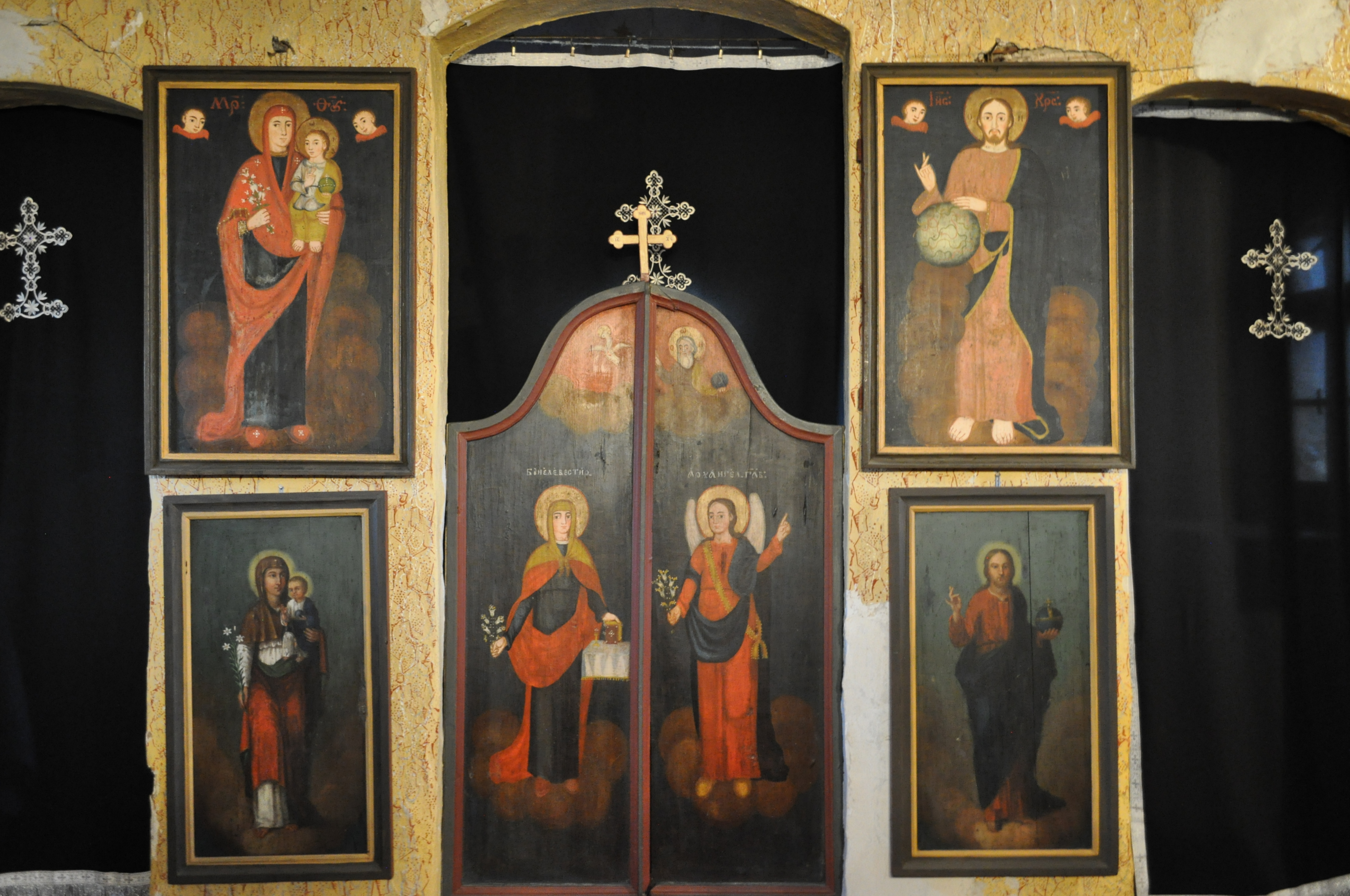 Biserica de lemn "Cuvioasa Paraschiva", sat DOBREŞTI; comuna BARA